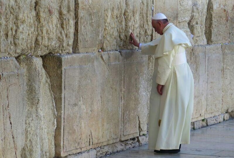 האפיפיור פרנציסקוס בכותל המערבי